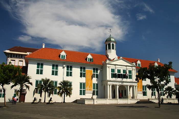 Gedung Museum Fatahillah di Jakarta, Indonesia